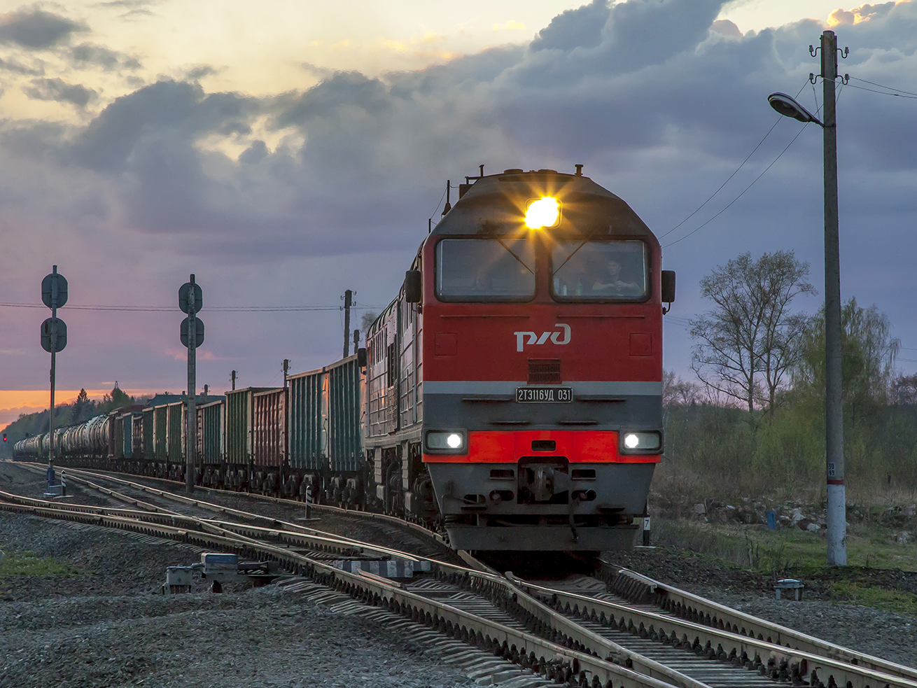 С завода поступил в депо Иваново